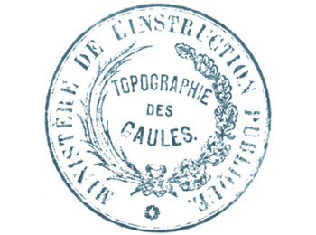 Tampon officiel de la Commission de topographie des Gaules (1858 - retravaillé en 2016)